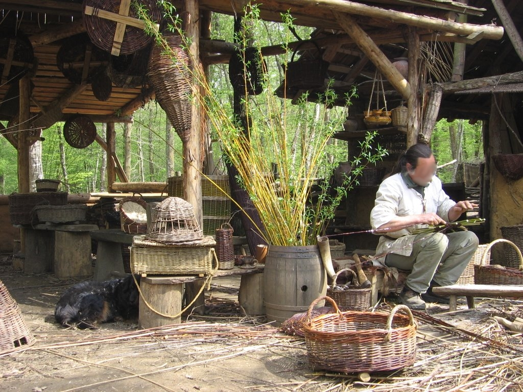 Vannier au travail au chantier médiéval de Guédelon